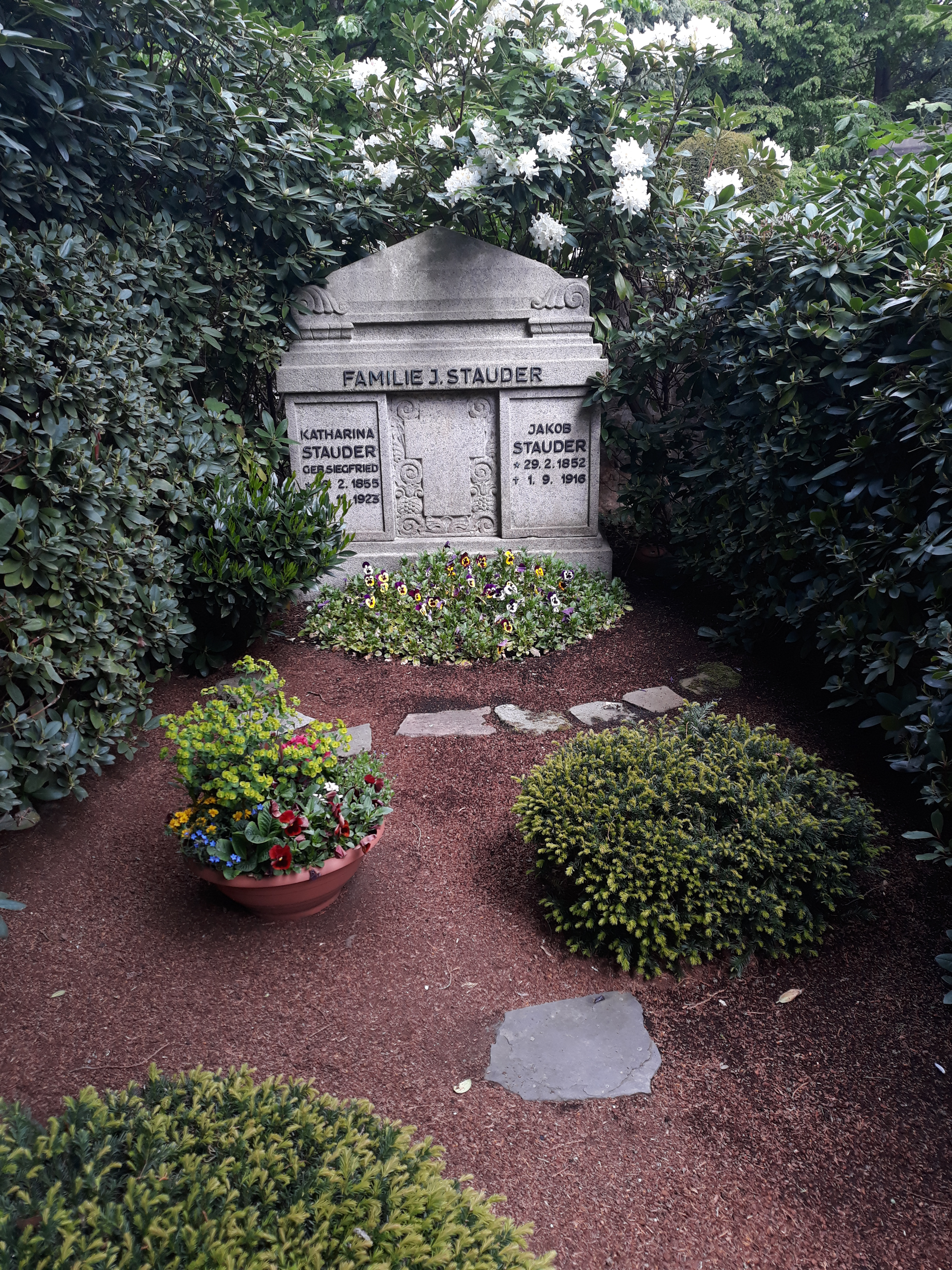 Das Grab des Bierbrauers Jakob Stauder und seiner Ehefrau Katharina (geborene Siegfried) auf dem Ostfriedhof Essen.